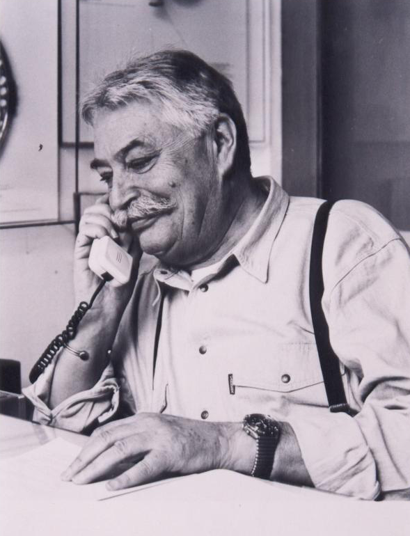 Dante Bighi è stato un graphic designer, artista, collezionista, viaggiatore e fotografo italiano.